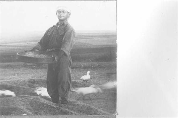 בן- ציון מיכאלי על רקע התבואה בגורן בסג'רה